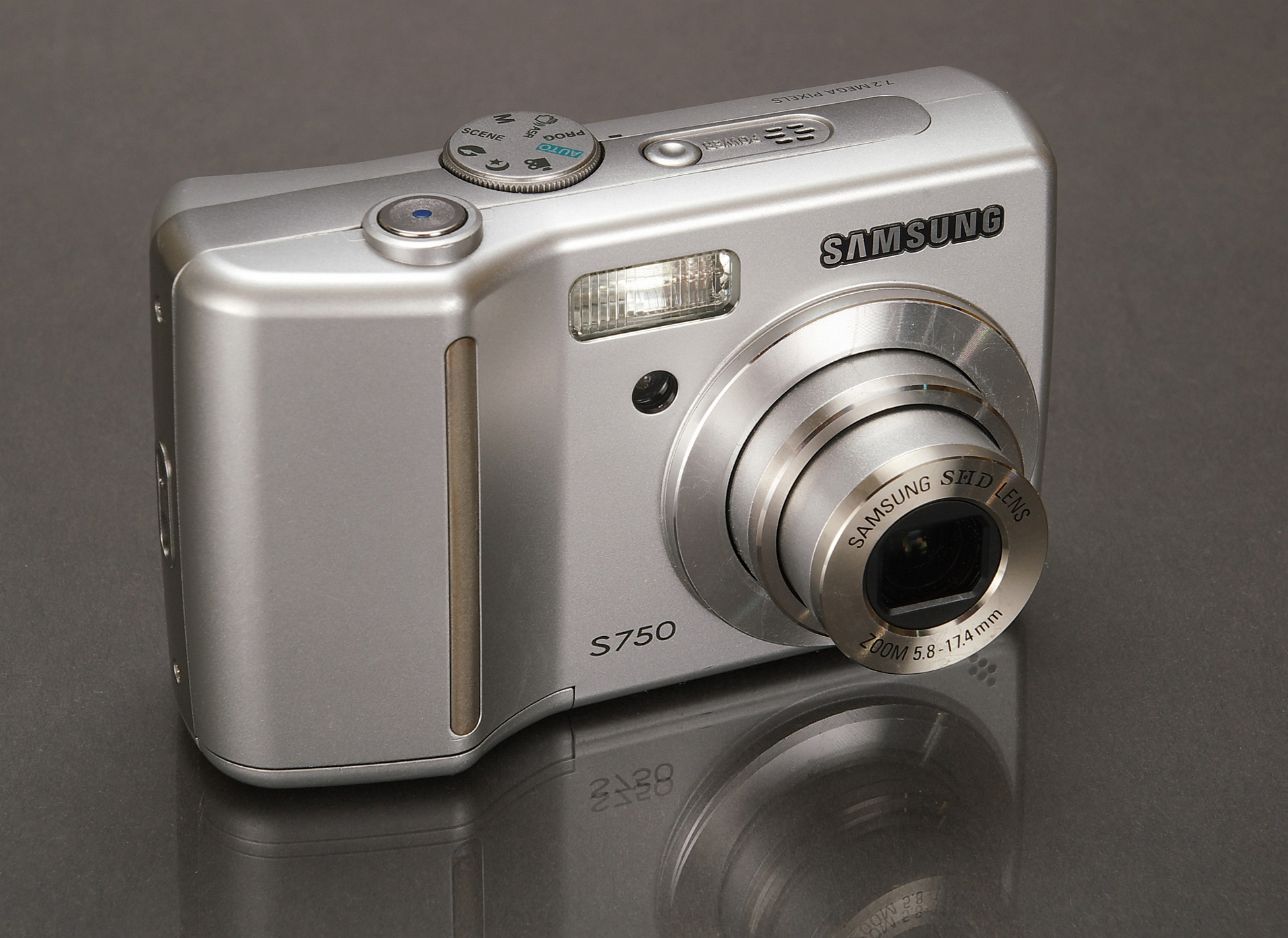 Kompakte Digitalkamera Samsung S750